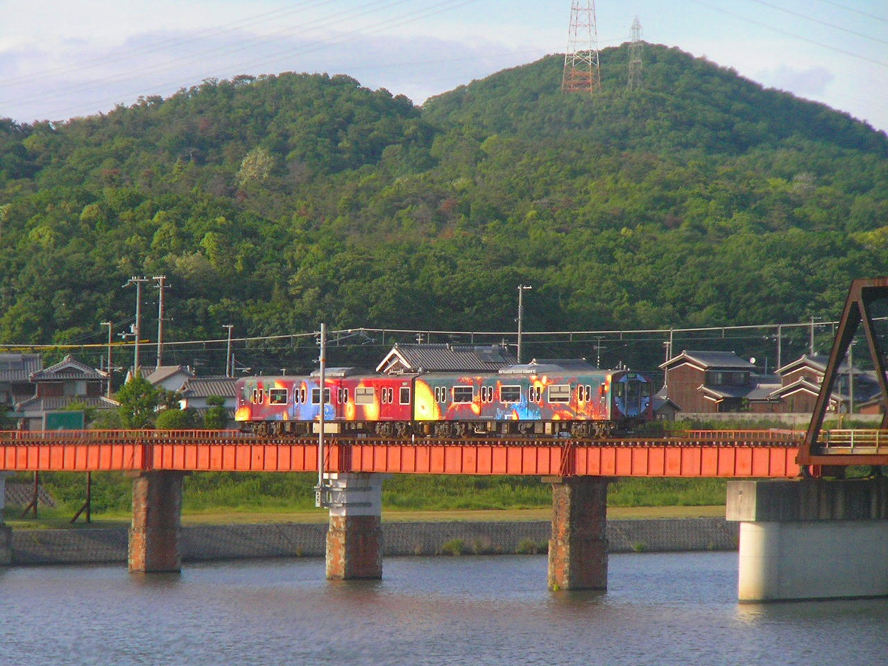 JR加古川線加古川（上荘町）厄神ー市場